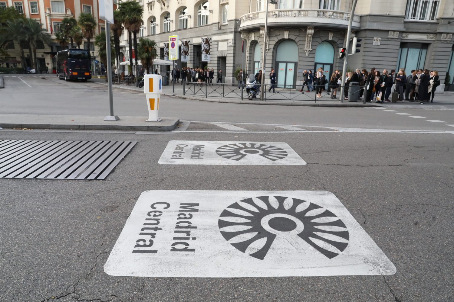 Este viernes arranca la zona de bajas emisiones Madrid Central. A partir de las 00:00 horas del 30 de noviembre. Con el objetivo de reducir la contaminación, el ruido y mejorar el espacio público. El Ayuntamiento ha mantenido contactos con asociaciones vecinales, comerciantes, administraciones y asociaciones profesionales para dar a conocer Madrid Central y recoger sugerencias. 29/11/2018. Dentro de unas horas comenzará Madrid Central. Este 30 de noviembre, a las 00:00, arranca esta zona de bajas emisiones, incluida en el Plan de Calidad del Aire y Cambio Climático, con el objetivo de reducir la contaminación, el ruido y mejorar el reparto del espacio público.